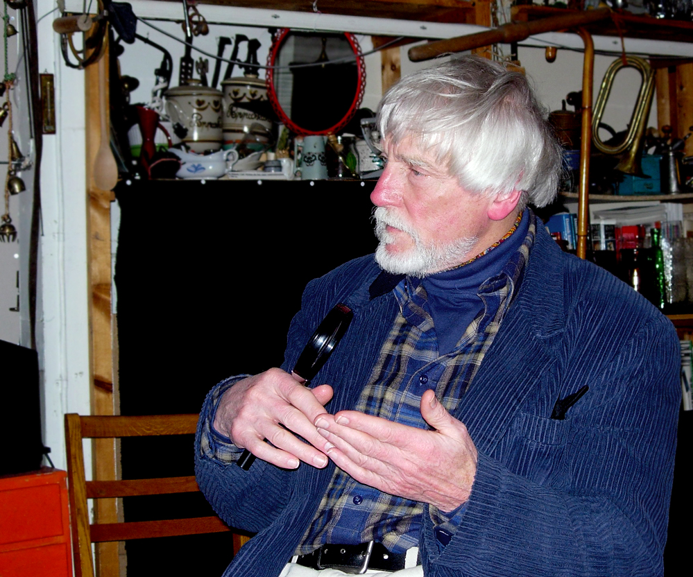 Eric Lennarth - Malmö 2005.